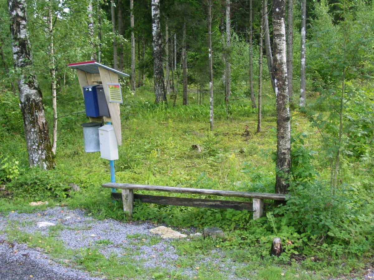 Kõlunõmme "külakeskus", Selveri rändpoe peatus (Pühalepa vald, Hiiumaa)